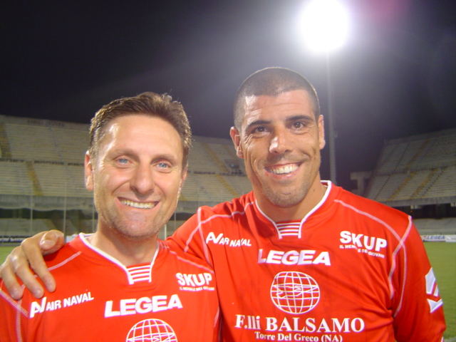 Carlo Ricchetti e Ciro De Cesare